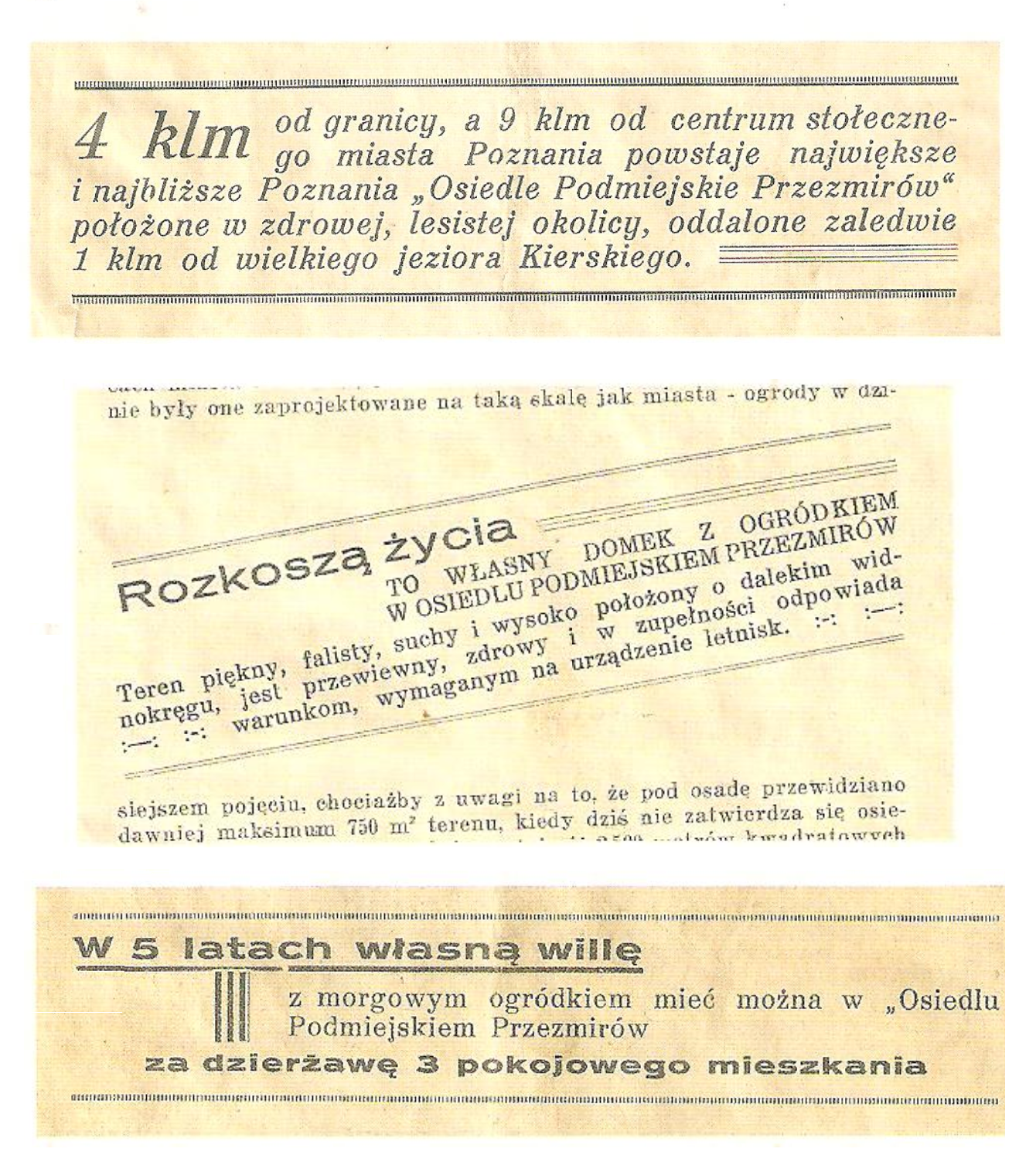 W początkach lat 30. XX wieku powstała koncepcja powstania Przeźmierowa jako "miasta-ogrodu"